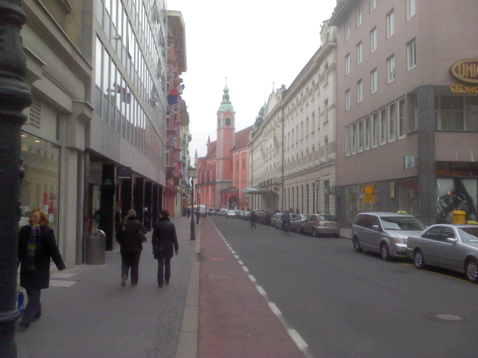 Miklošičeva cesta v Ljubljani: kolesarski pas